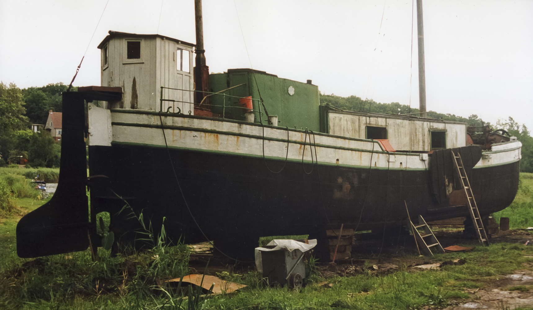 Foto des in Seedorf (Rügen) auf Land liegenden Besanewers "Alfred" während der Reparaturarbeiten im September 1994